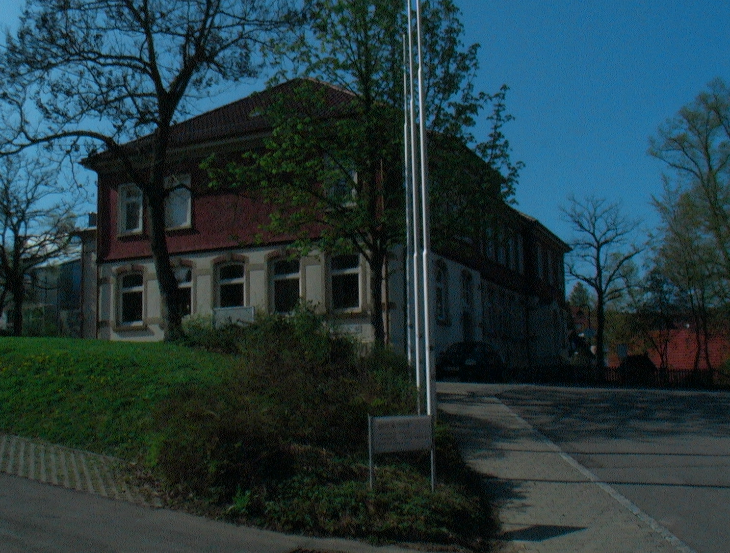 Das Rathaus von Sondelfingen bei Reutlingen befindet sich im alten Schulgebäude.